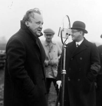 Der jubelnde Empfang des Luftschiffes "Graf Zeppelin" in der Reichshauptstadt Berlin! Der bekannte Rundfunkansager Alfred Braun, welcher die Zeppelinempfangsfeierlichkeiten in Berlin durch den Rundfunk mitteilte.